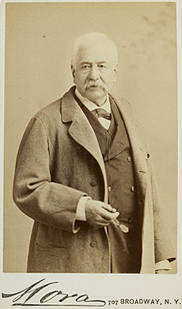 Ferdinand de Lesseps (1805-1894)